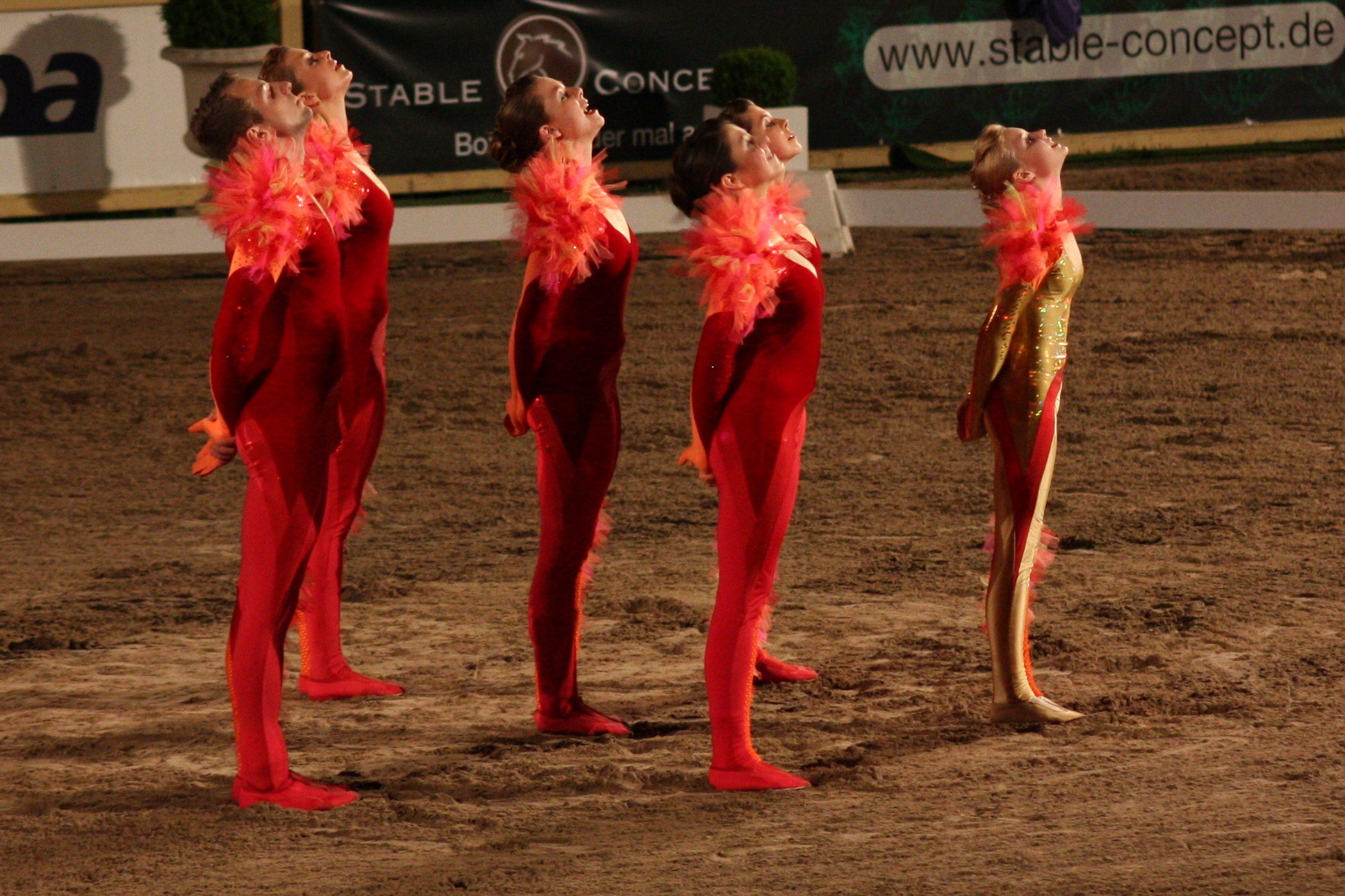 77. Internationales Pfingstturnier Wiesbaden 2013, CVI *** Voltigieren, VV Ingelsberg I mit Lazio 9 Personality rights warning Although this work is freely licensed or in the public domain, the person(s) shown may have rights that legally restrict certain re-uses unless those depicted consent to such uses. In these cases, a model release or other evidence of consent could protect you from infringement claims.